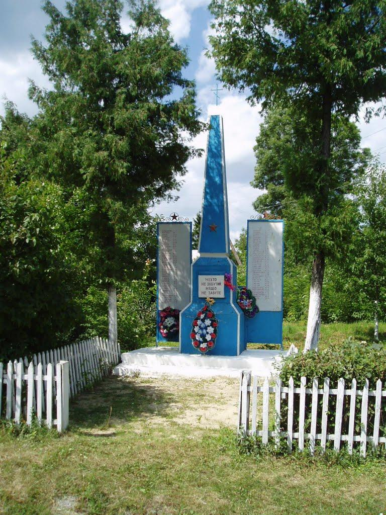 Меморіал односельчанам,які загинули піч час ВВВ